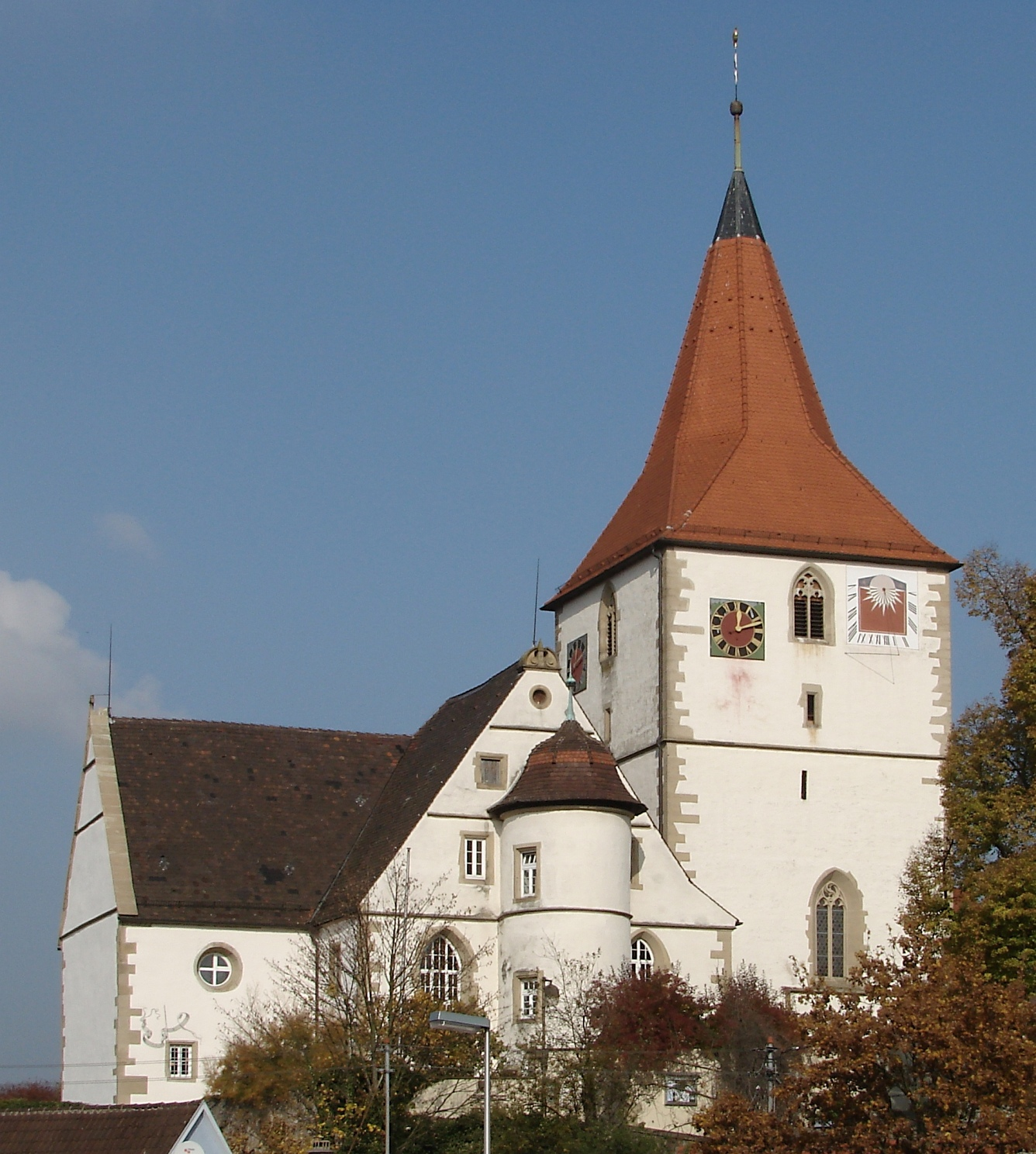 Freiberg am Neckar, Germany, Amandus church